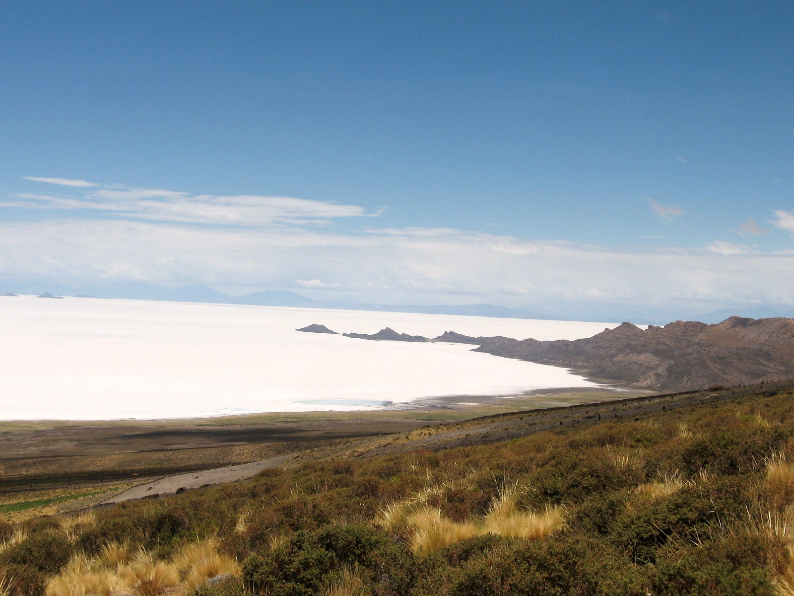 vista panorámica del Salar de Uyuni desde la orilla.